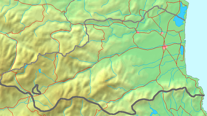 A blank map of Pyrénées-Orientales (French department).